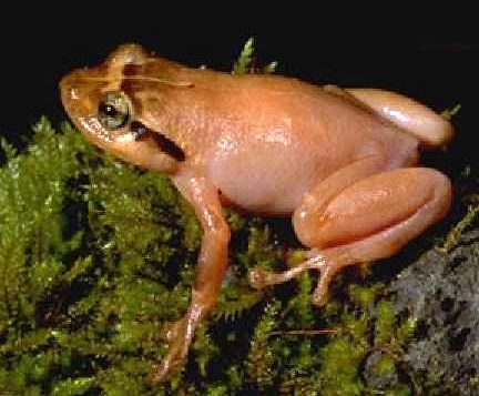 Nouvelle version de File:Platypelis tuberifera.jpg (correction des niveaux + découpage de l'image)